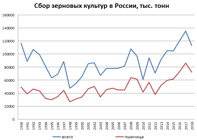 Сбор зерновых культур в России, тыс. тонн